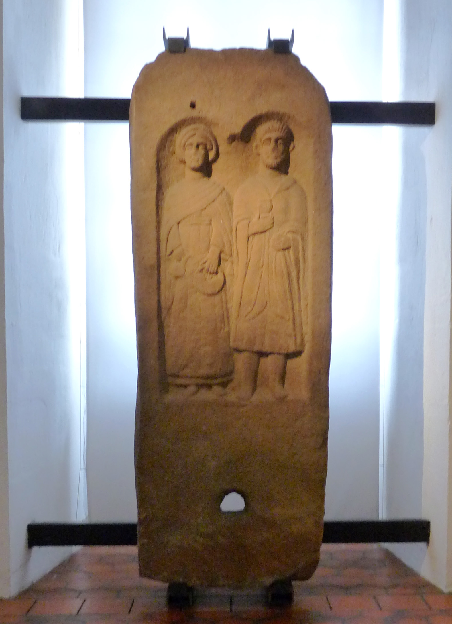 Stèle funéraire d'un couple de paysans (3e siècle après JC), trouvée à Oberhaslach